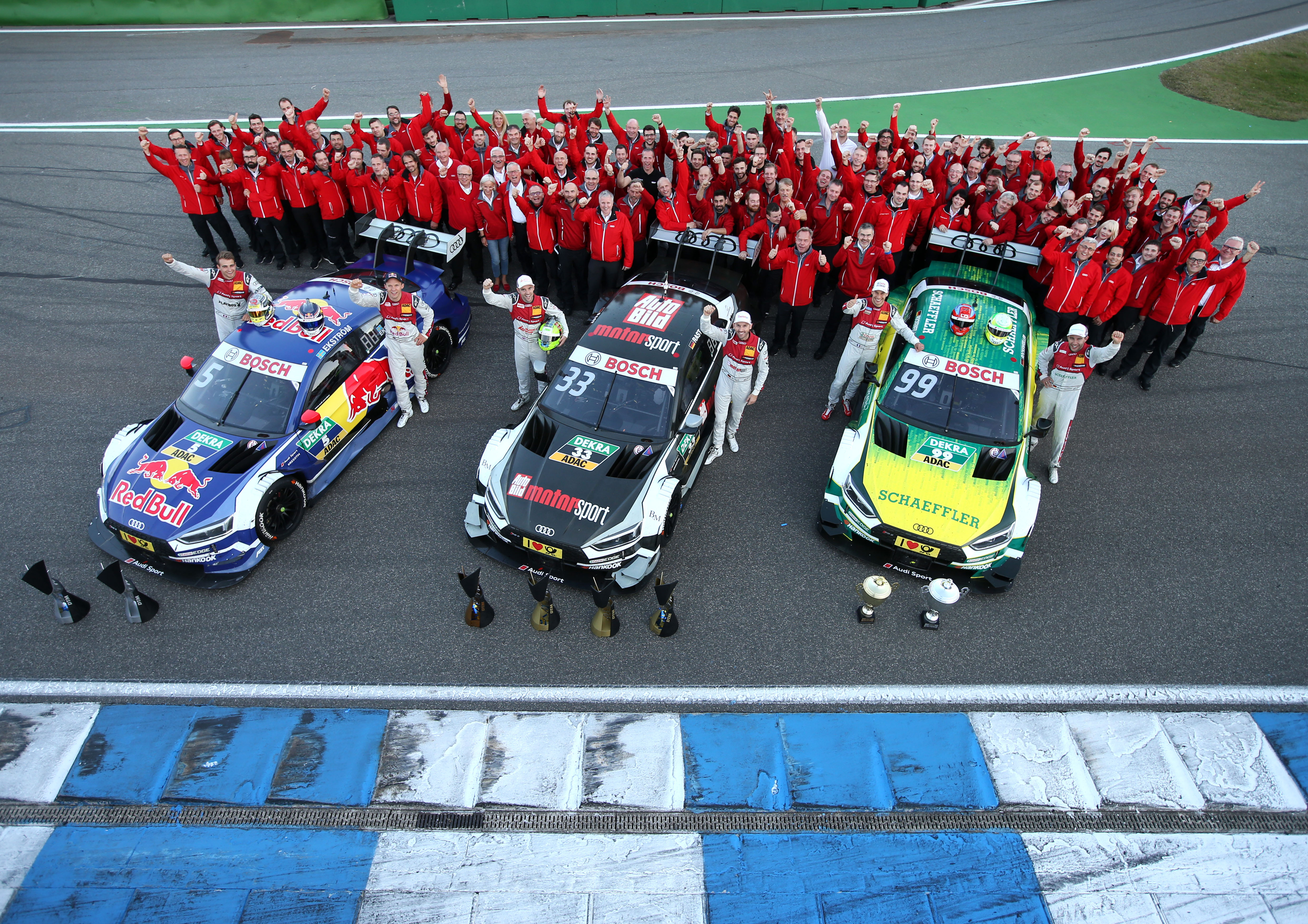 Mattias Ekström, Red Bull Audi RS 5 DTM, DTM Finale Hockenheim 2017